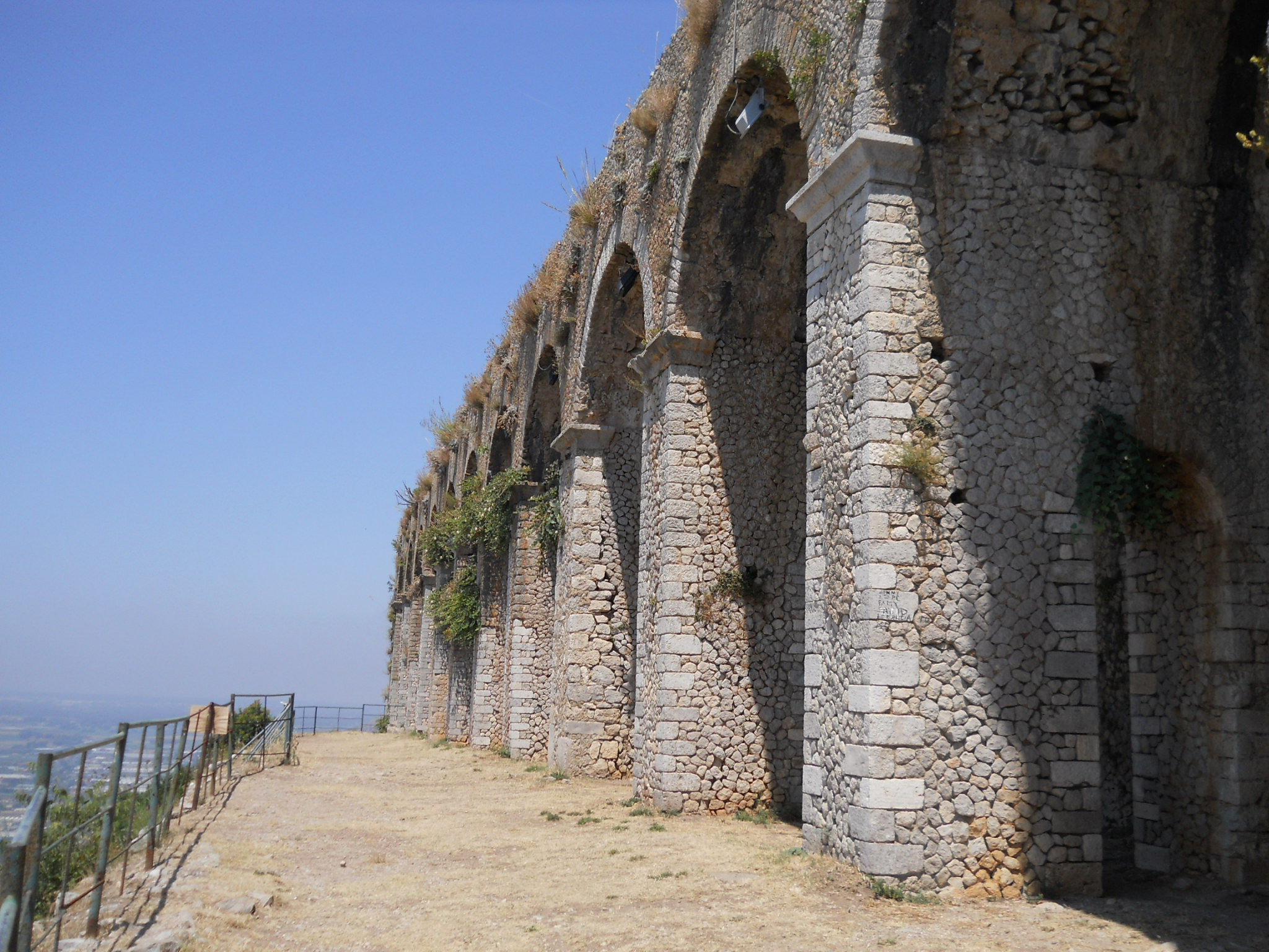 Tempio di Giove Anxur This is a photo of a monument which is part of cultural heritage of Italy.